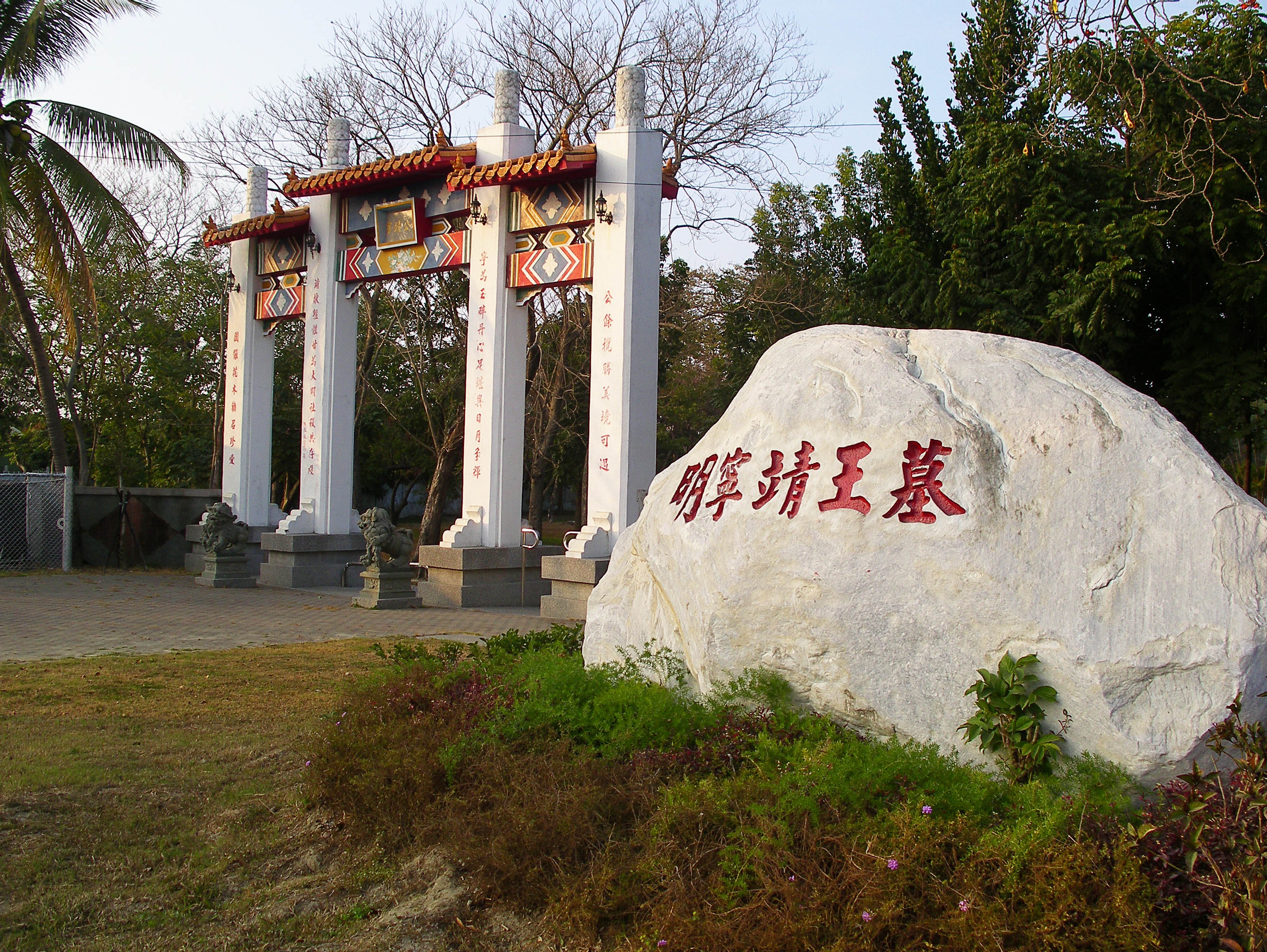 寧靖王墓門口